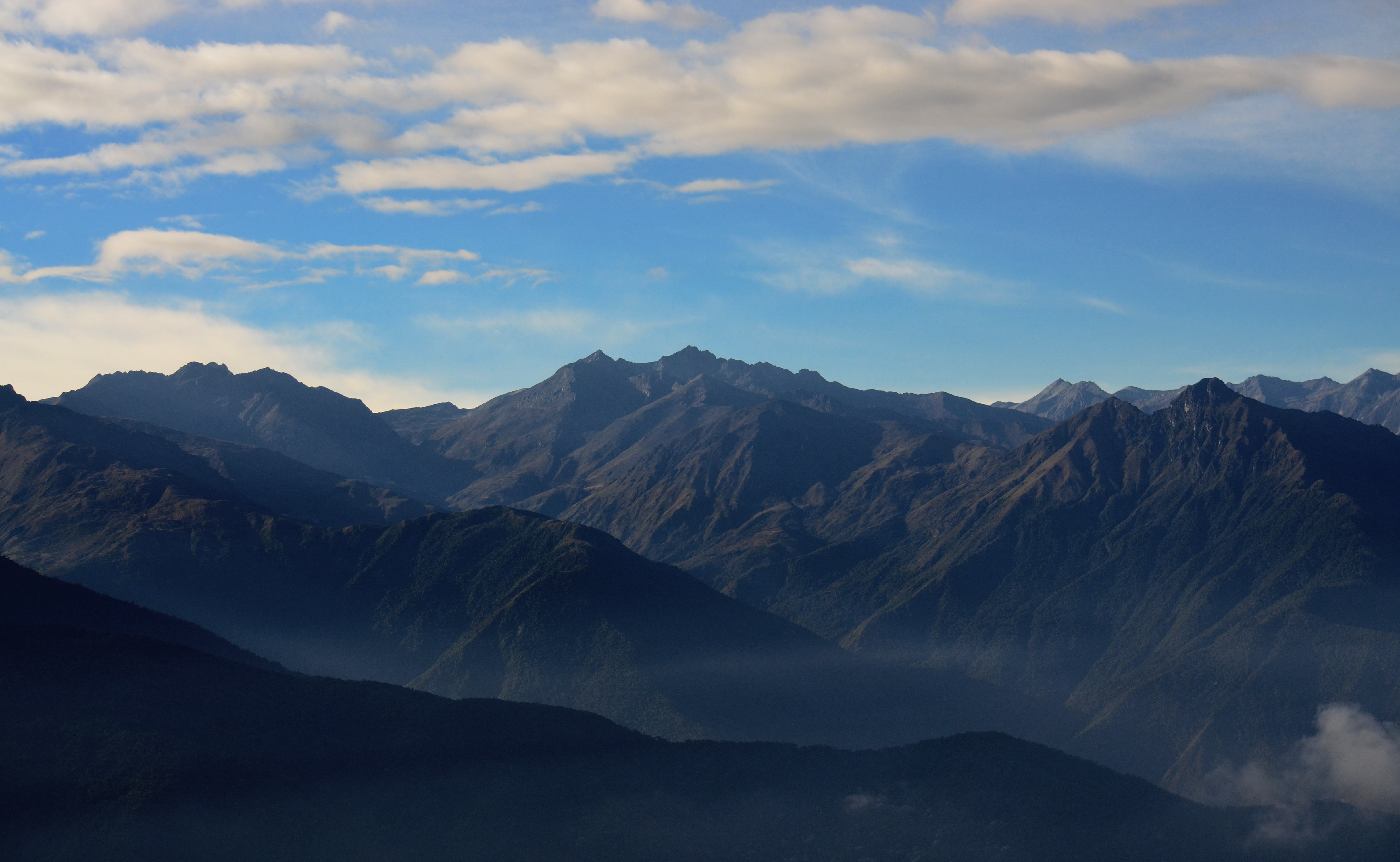 Vista en vuelo de la Sierra La Culata, margen norte de la Cordillera de Los Andes a su paso por Merida, Venezuela.